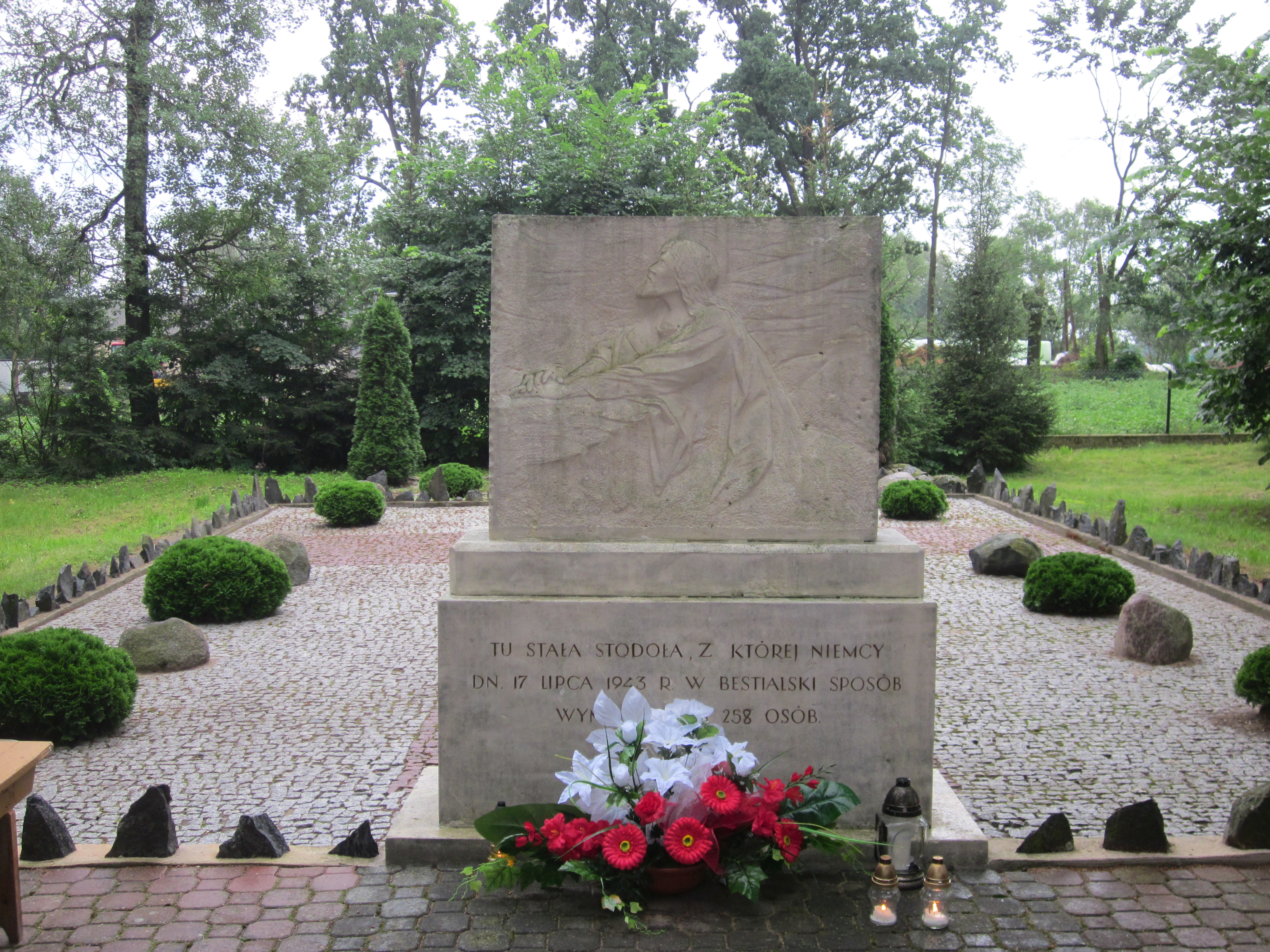 fotografia została zrobiona podczas uroczystości upamiętniającej 73 Rocznice Mordu Mieszkańców wsi Krasowo-Częstki w dniu 17 lipca 2016 roku.